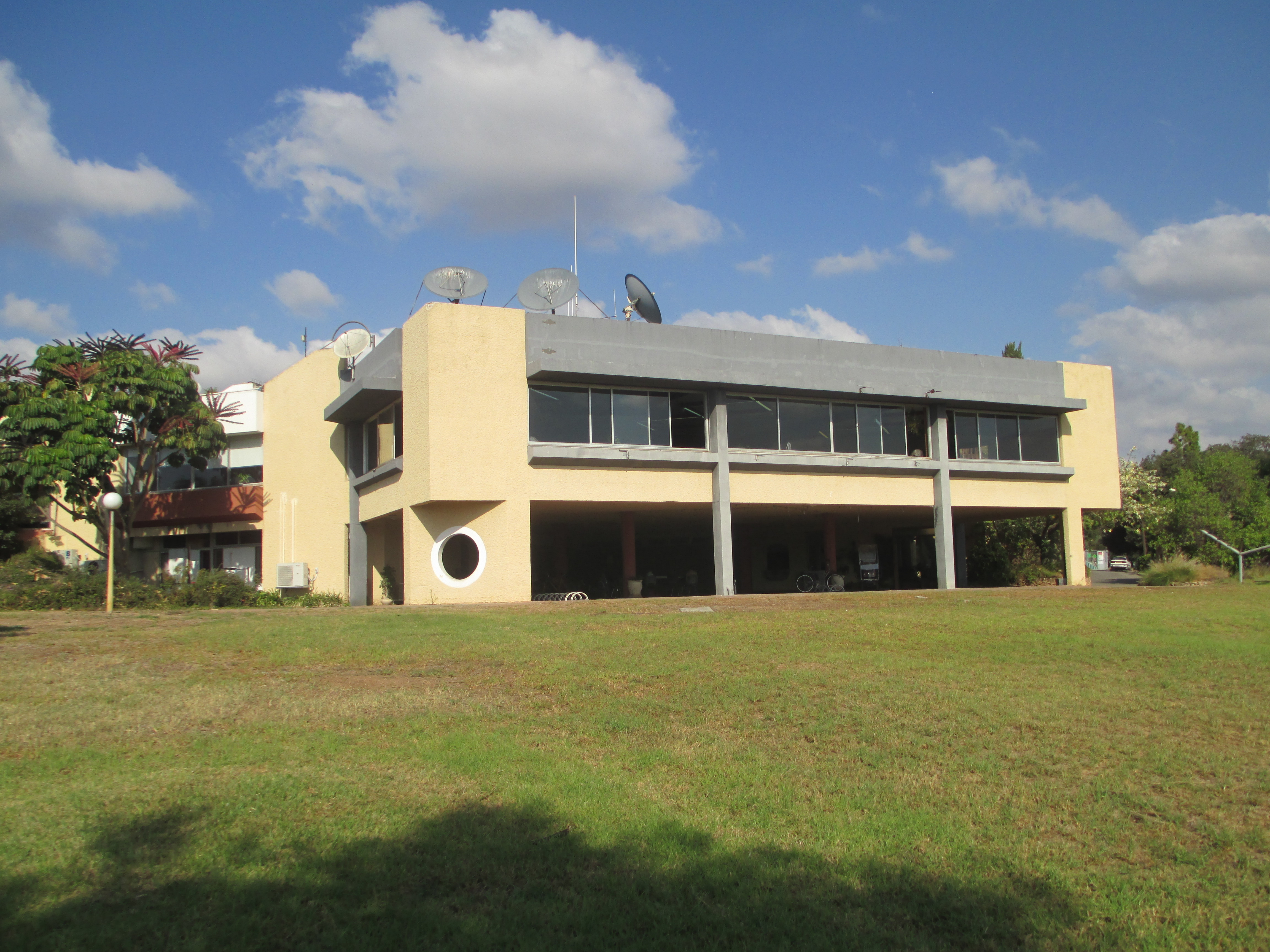 חדר האוכל בקיבוץ בית העמק